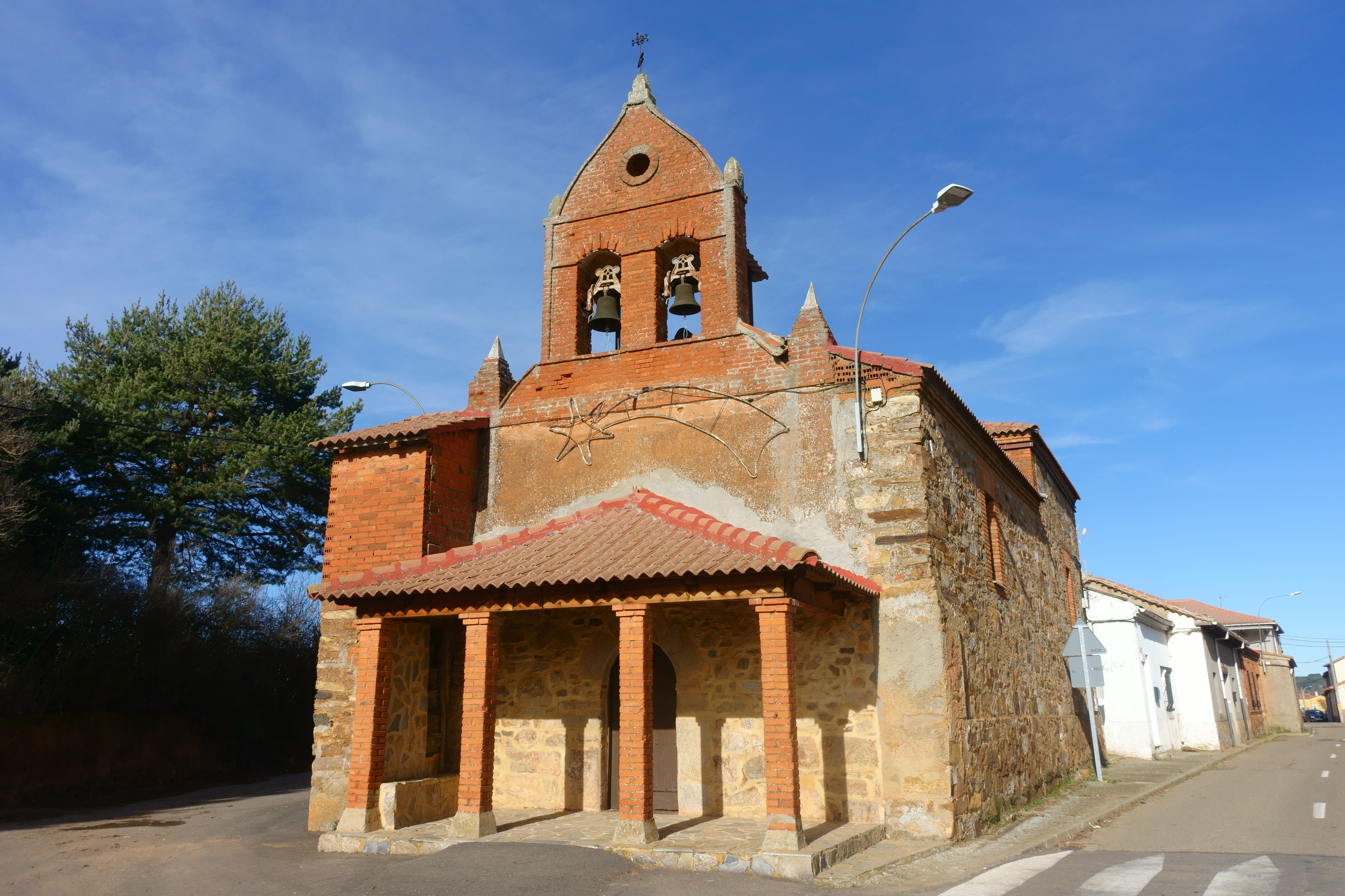 Iglesia de San Pelayo, Villaobispo de Otero (León, España).